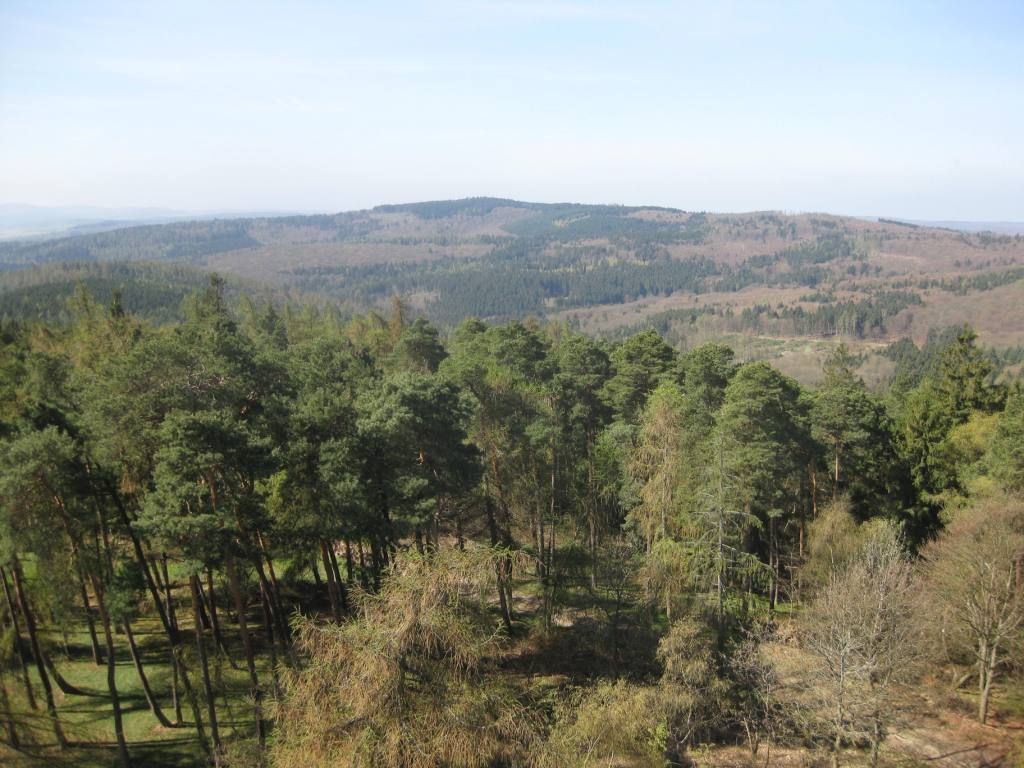 Blick Aussichtsturm auf dem Hausberg zum Hesselberg